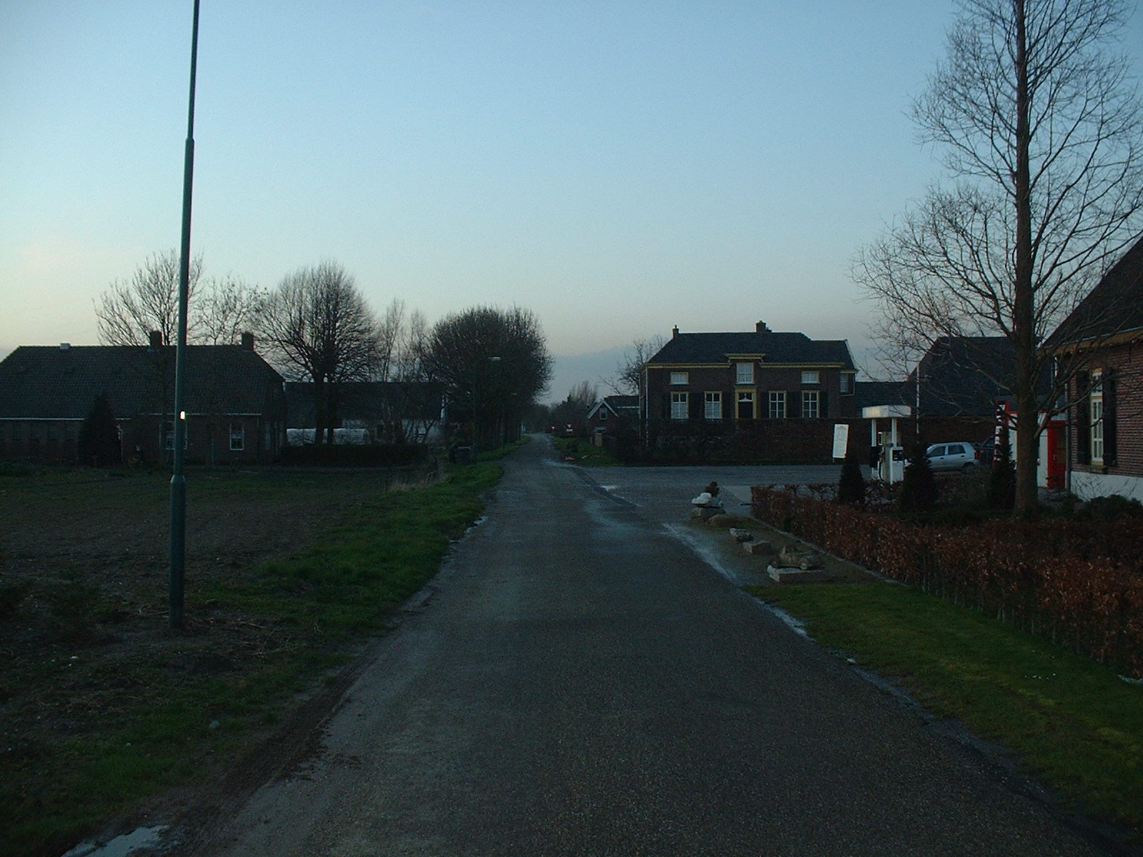 Slijkwell settlement near Well, Gelderland, Netherlands